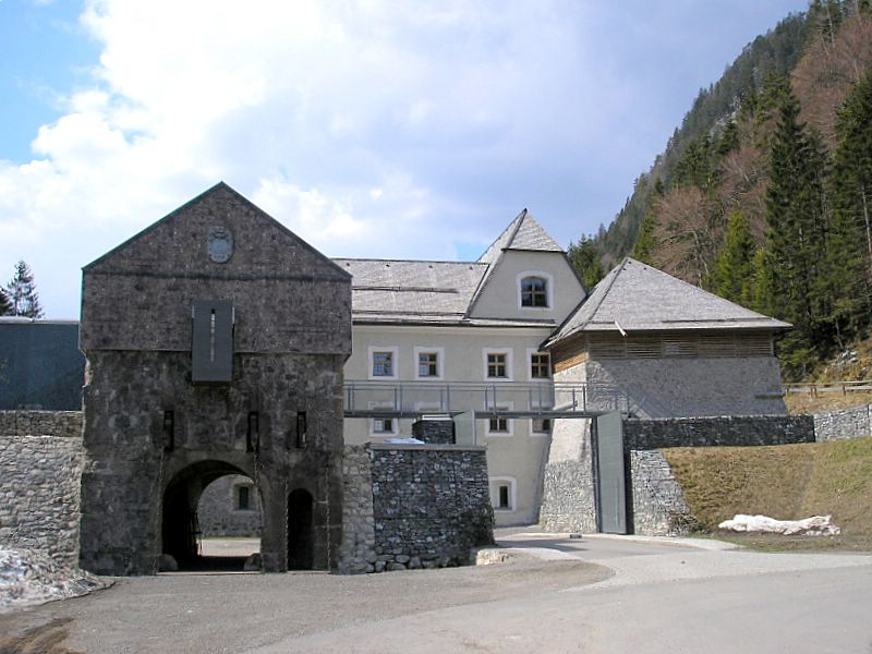 Burg Ehrenberg bei Reutte (Tirol). Die restaurierte Klause von Norden mit dem Tor des Hornwerkes. This media shows the remarkable cultural object in the Austrian state of Tyrol listed by the Tyrolean Art Cadastre with the ID 28387. (on tirisMaps, pdf, more images on Commons, Wikidata)